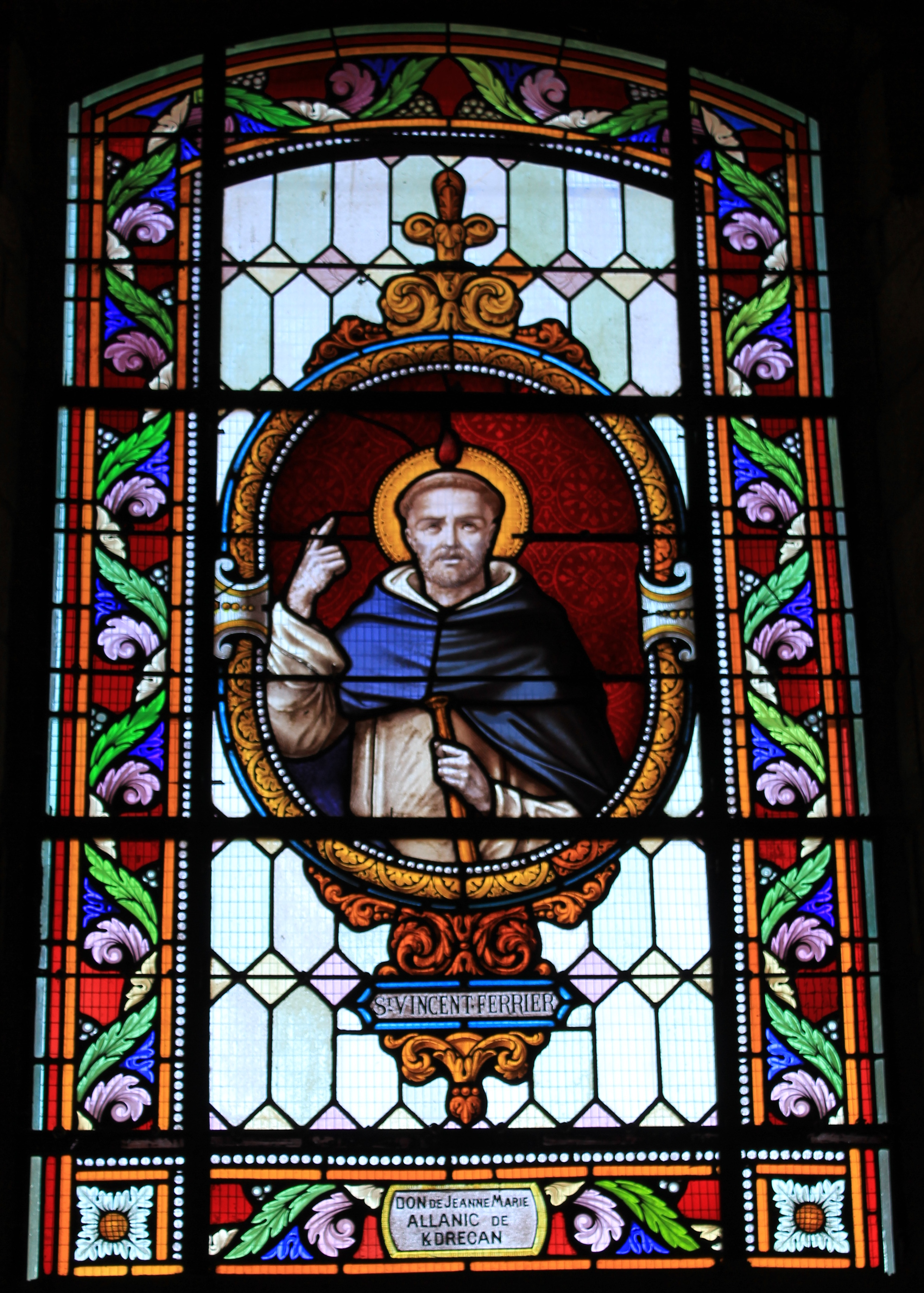 église Saint-André (Brech) : vitrail Saint-Vincent Ferrier